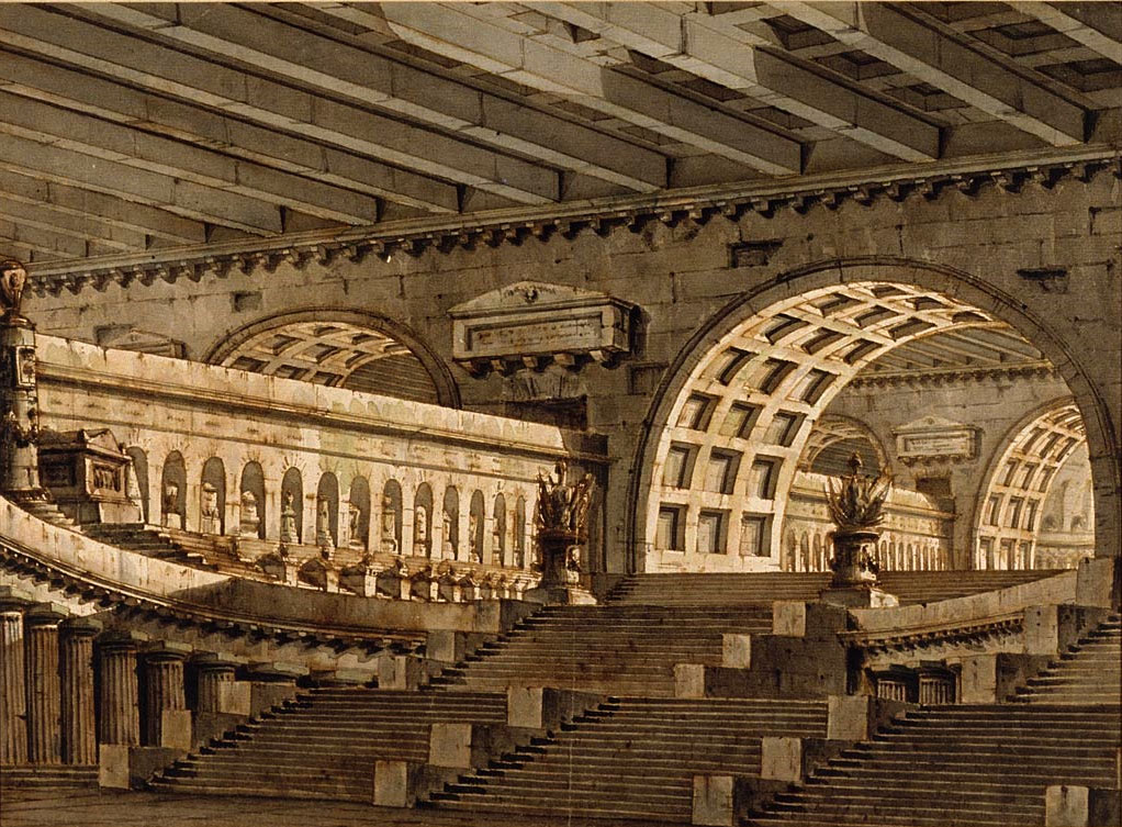 Subterranean Mausoleum